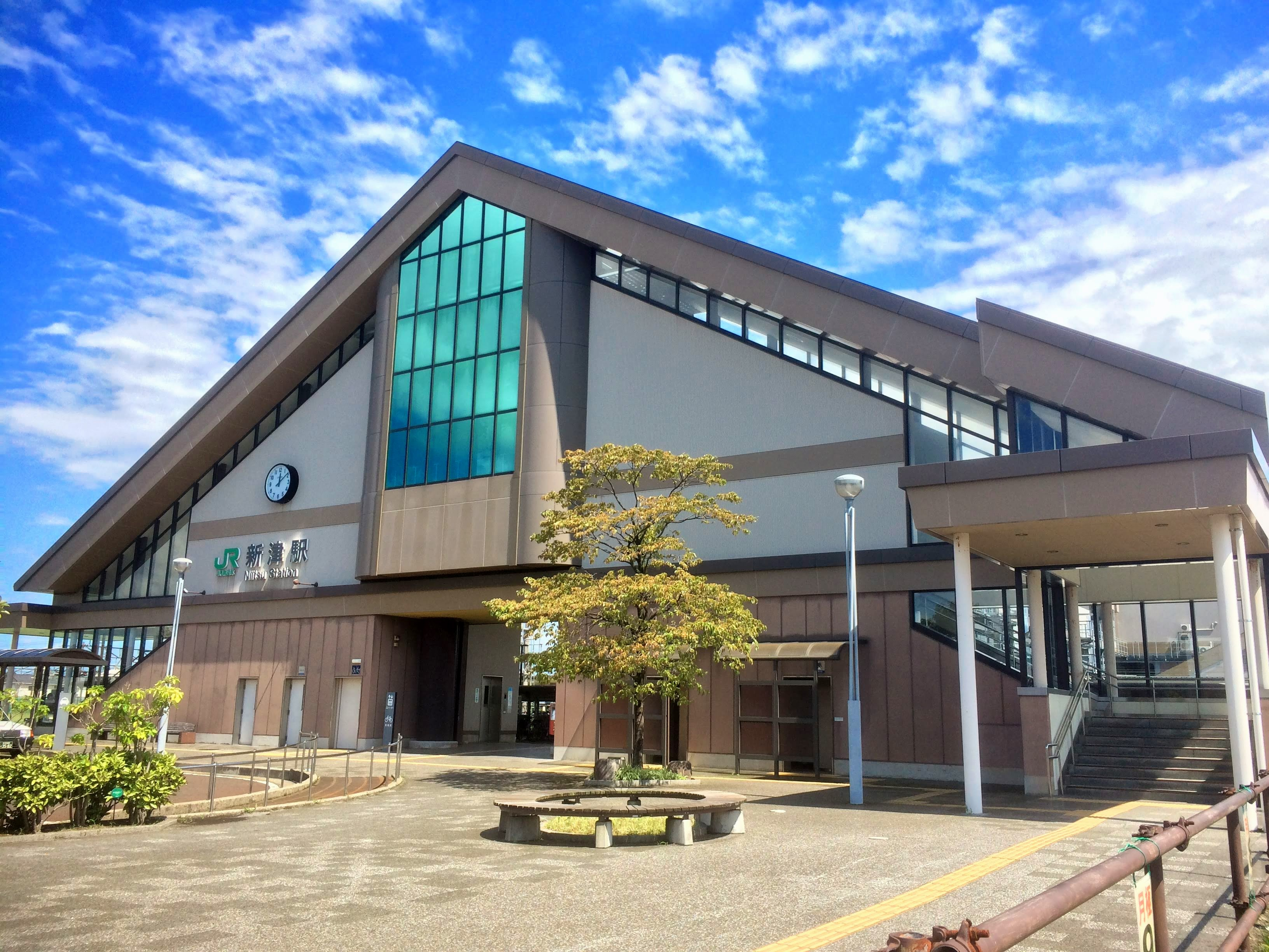 新津駅 西口駅舎